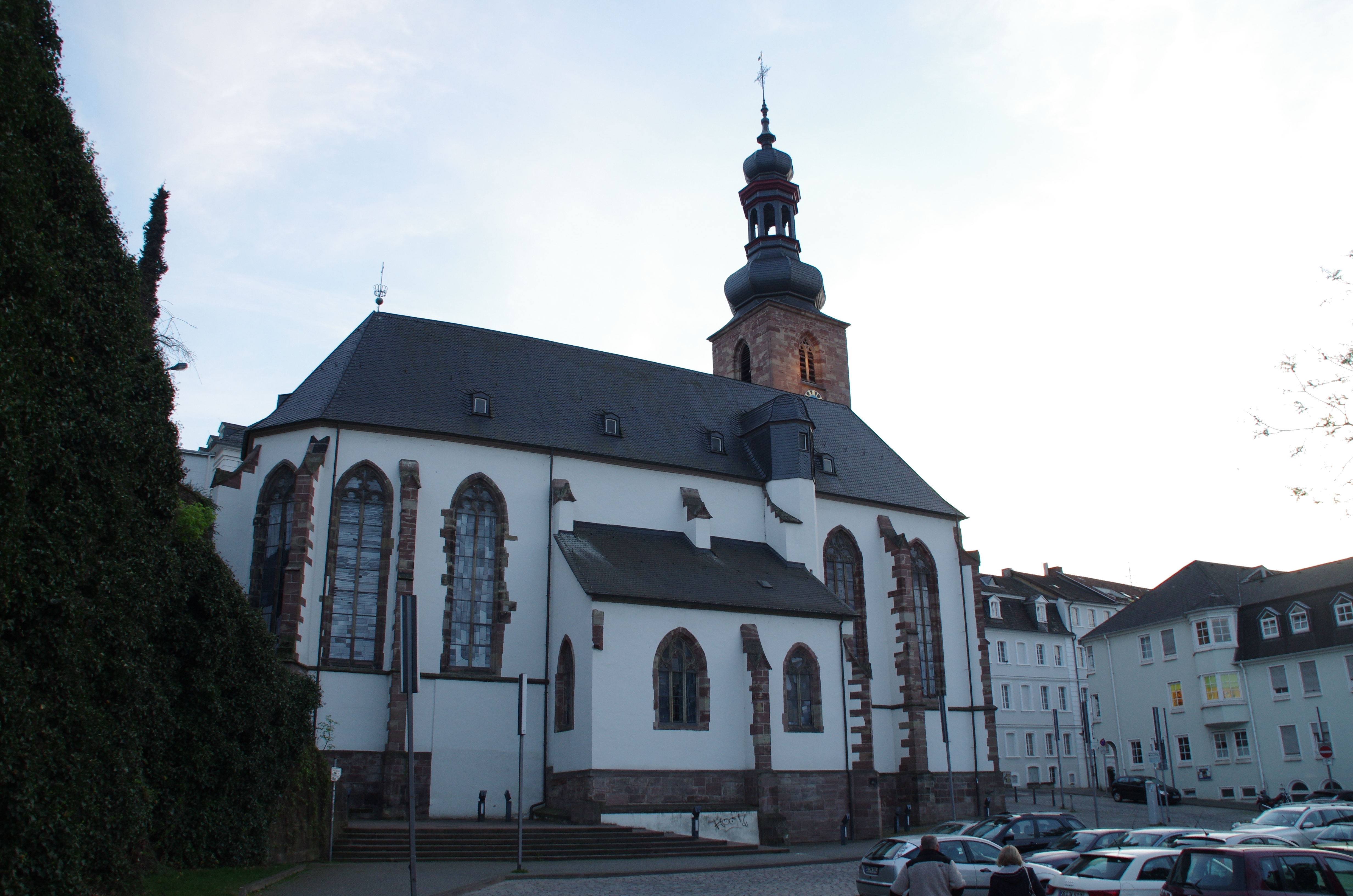 Saarbrücken in Deutschland. Die Schlosskirche ist eine ehemalige Kirche in Saarbrücken. Seit 2004 ist sie ein Museum für Sakralkunst.